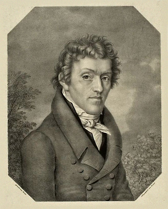 Bildnis des deutschen Philologen Georg Friedrich Creuzer, Lithographie von Joseph Nikolaus Peroux nach einem Gemälde von Jakob Wilhelm Christian Roux